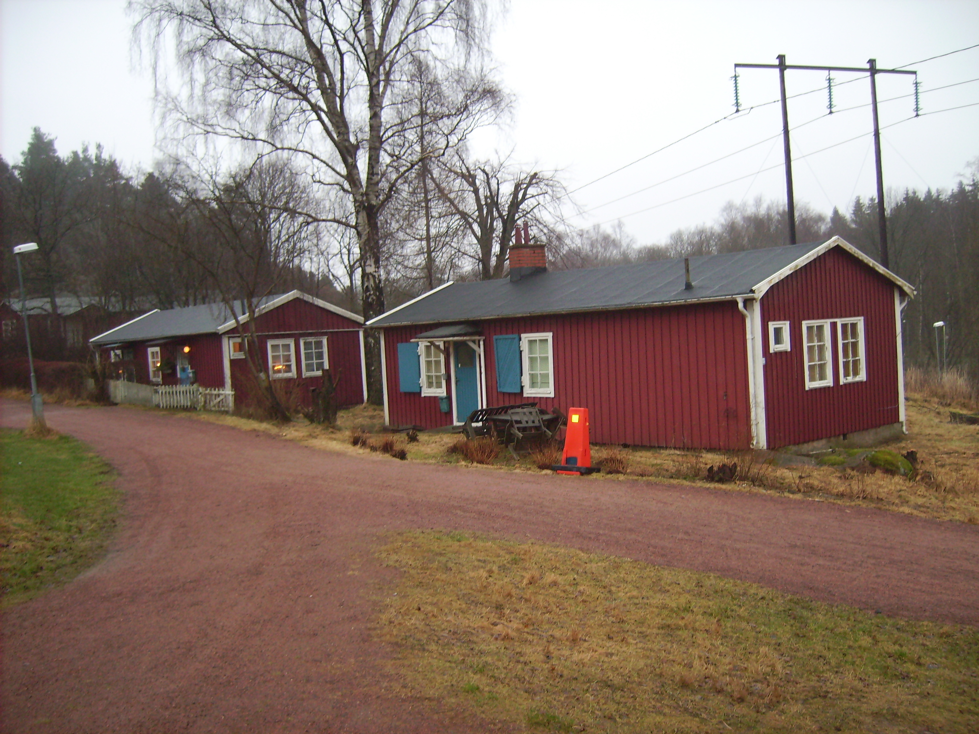 Skatås in Gothenburg.